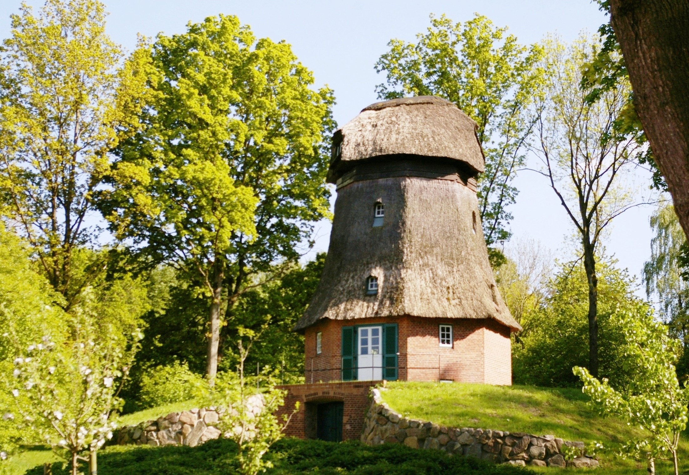 Abgewrackte Windmühle beim Gut Manhagen